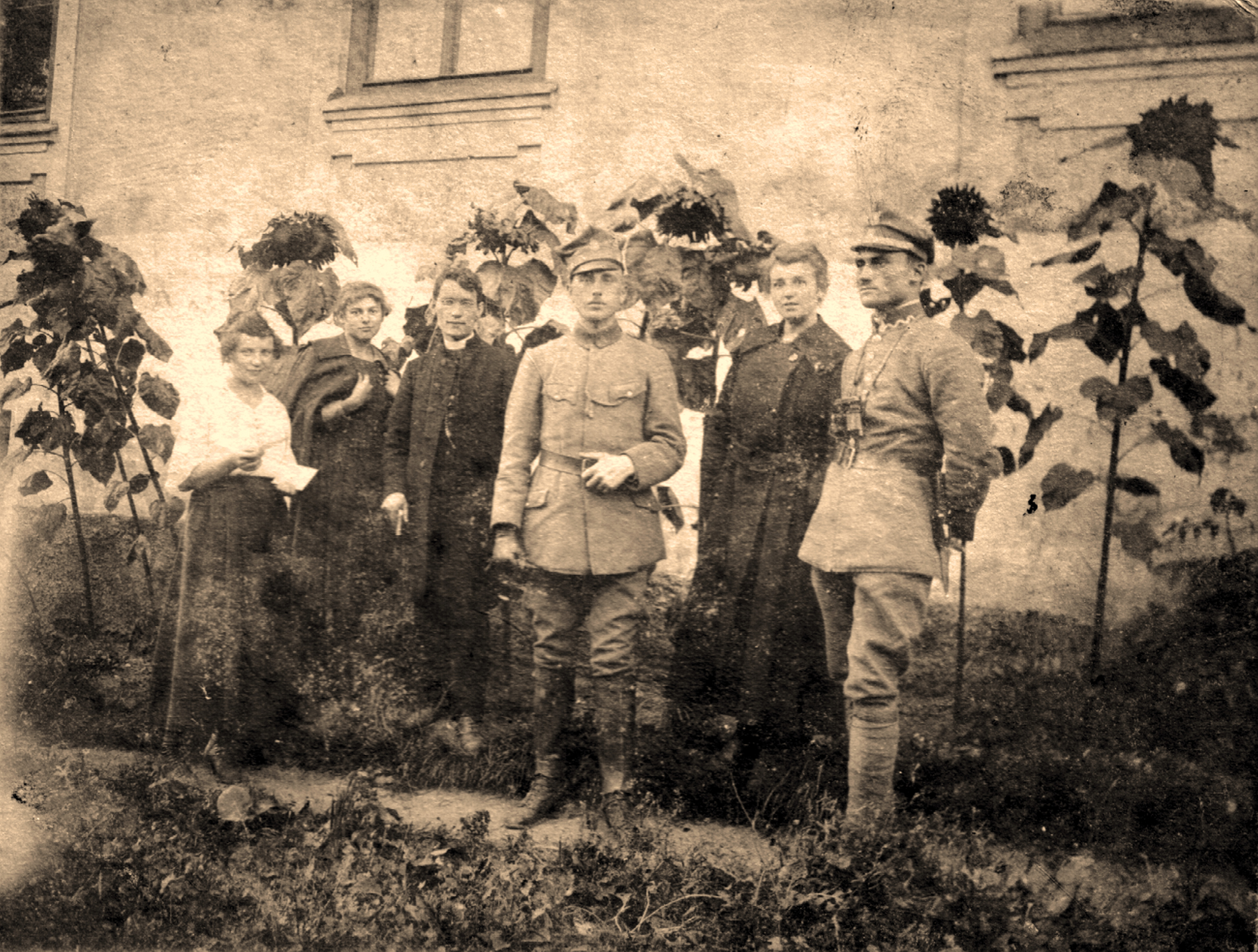 Dziedzice, przed karczmą Jana Stryczka, wrzesień 1919 roku, Komitet Opieki nad Powstańcami. Stoją od prawej: Stanisław Krzyżowski (inicjator I Powstania Śląskiego), Maria Stryczek (jego narzeczona, córka Jana); od lewej: Emilia Stryczek, Aniela Stryczek (córki Jana, siostry Marii) i ks. Faustyn Herrmann